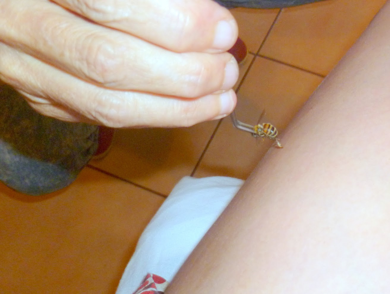 טיפול באפיתרפיה